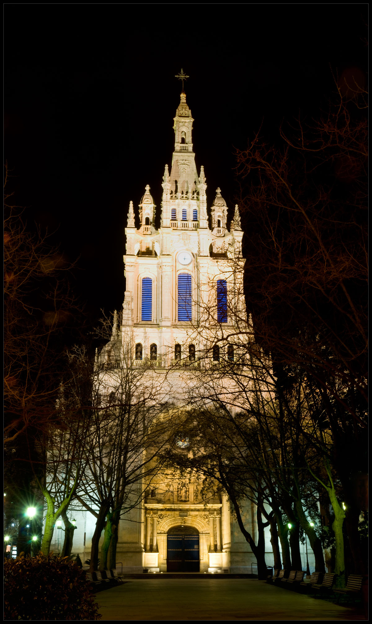 Foto de la entrada principal a la Basílica de Begoña en Bilbao. Panorámica vertical nocturna montada con 4 fotografias.